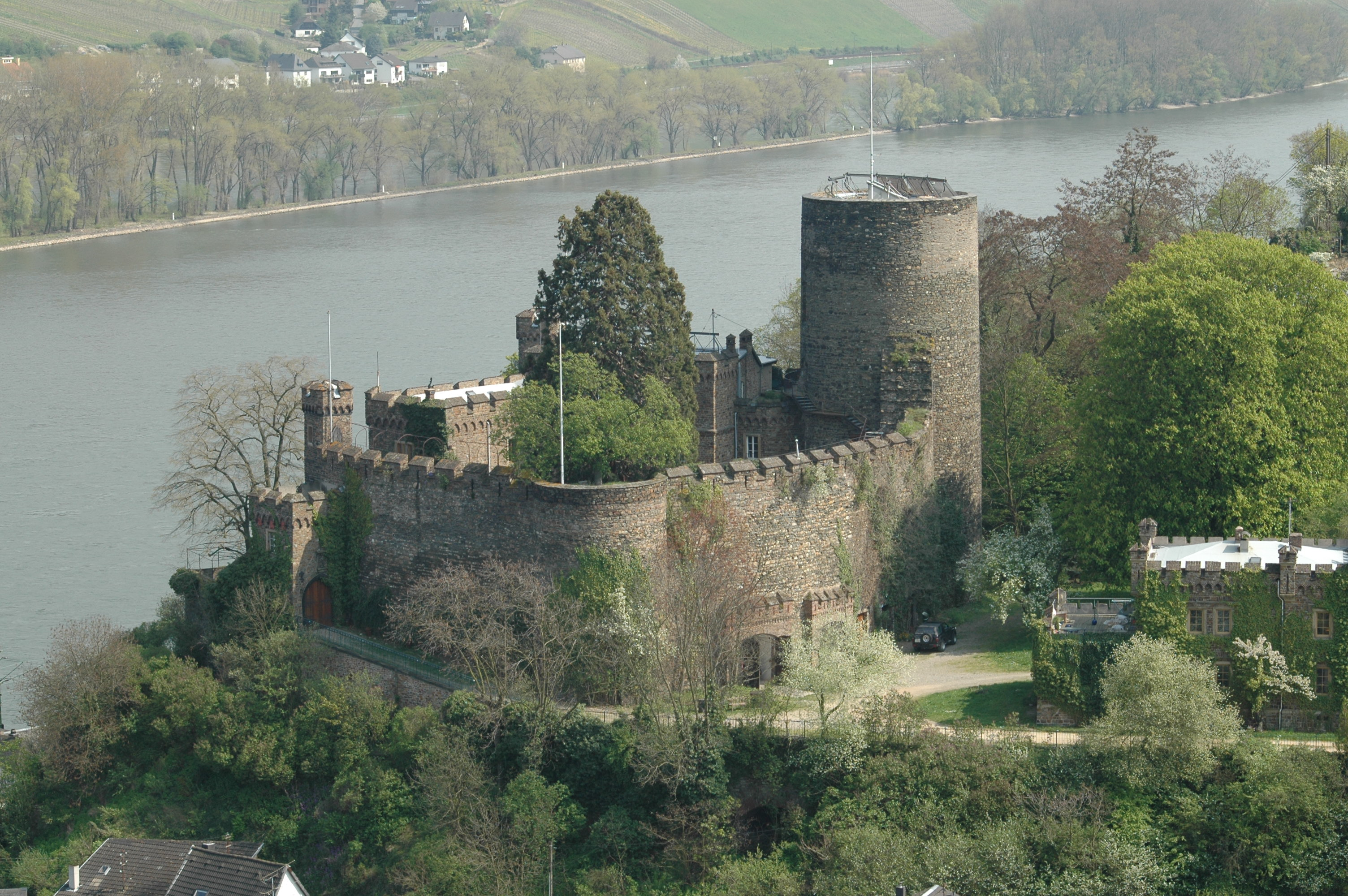 Heimburg von Nordosten